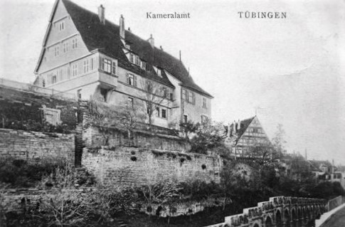 Kameralamt von Tübingen auf dem Schulberg 14, Blick von der Mühlstraße (Postkarte). [Im dem Gebäude brfinden sich jetzt Gerichtsbüros, u.a. Zwangsvollstreckungsabteilung des Amtsgerichtes.]